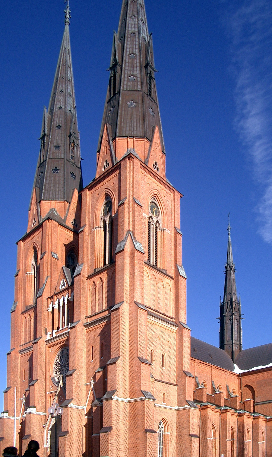 Uppsala domkyrka